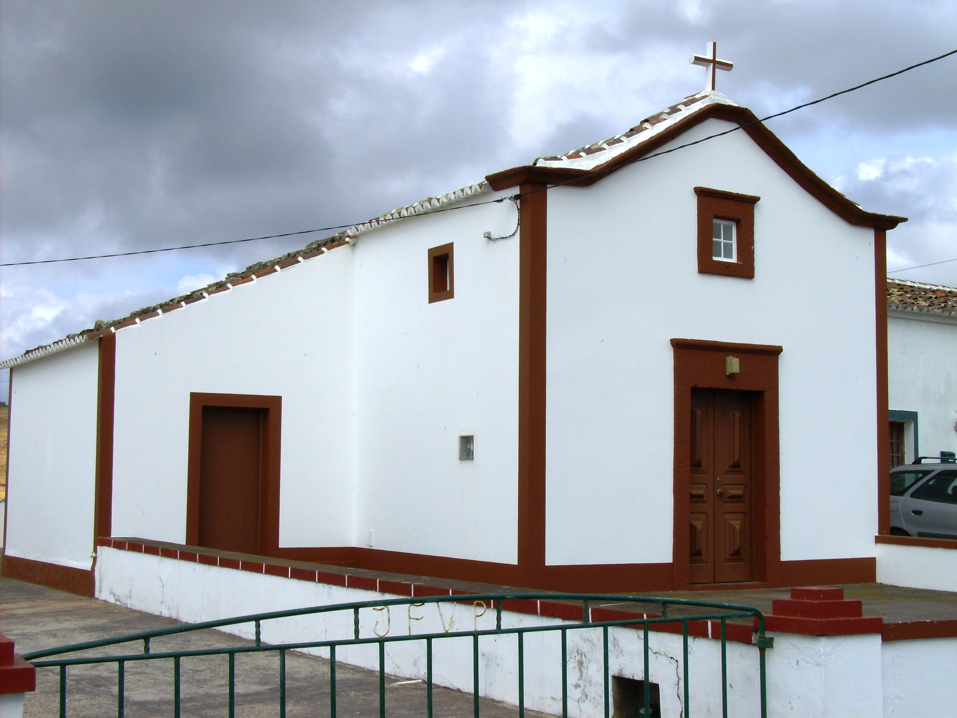 Ermida de Nossa Senhora da Boa Viagem, Ilha de Santa Maria (Açores), Portugal.